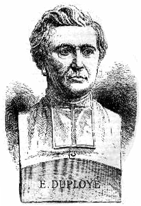 Gravure d'Émile Duployé. Cette image provient du site Historia de la taquigrafía, mais on peut la retrouver sur d'autres sites comme l'Institut de Sténographie Suisse Duployé. Note de Haypo, j'ai retravaillé l'image originale avec Gimp pour l'améliorer légèrement. Cette gravure est très certainement tombée dans le domaine public étant donné l'anciennetée de la sténographie.